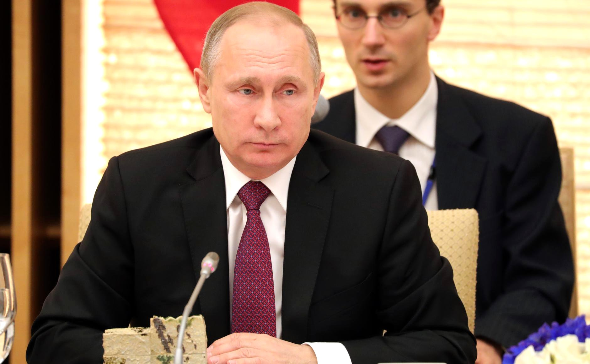 Президент России Владимир Путин во время переговоров с Премьер-министром Японии Синдзо Абэ